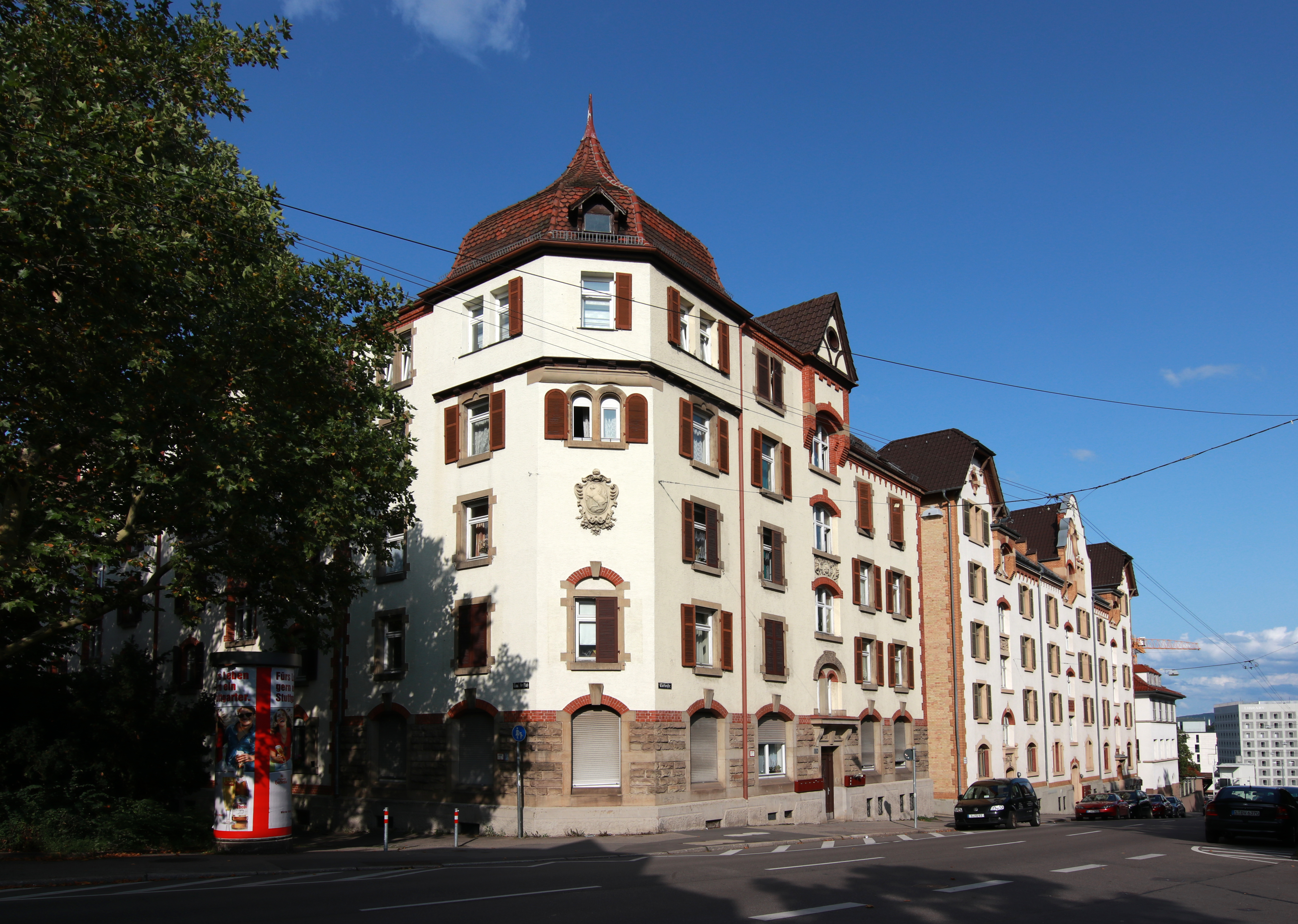 Arbeiterwohnhäuser Türlenstraße 30 abwärts in Stuttgart. Erbaut 1900-1903 von Hochbauamt Stuttgart, Mayer und Pantle im Stil des Historismus. Geschützt nach § 2 DSchG